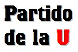 Tipos usados en la imagen del partido de la U (sin logo)